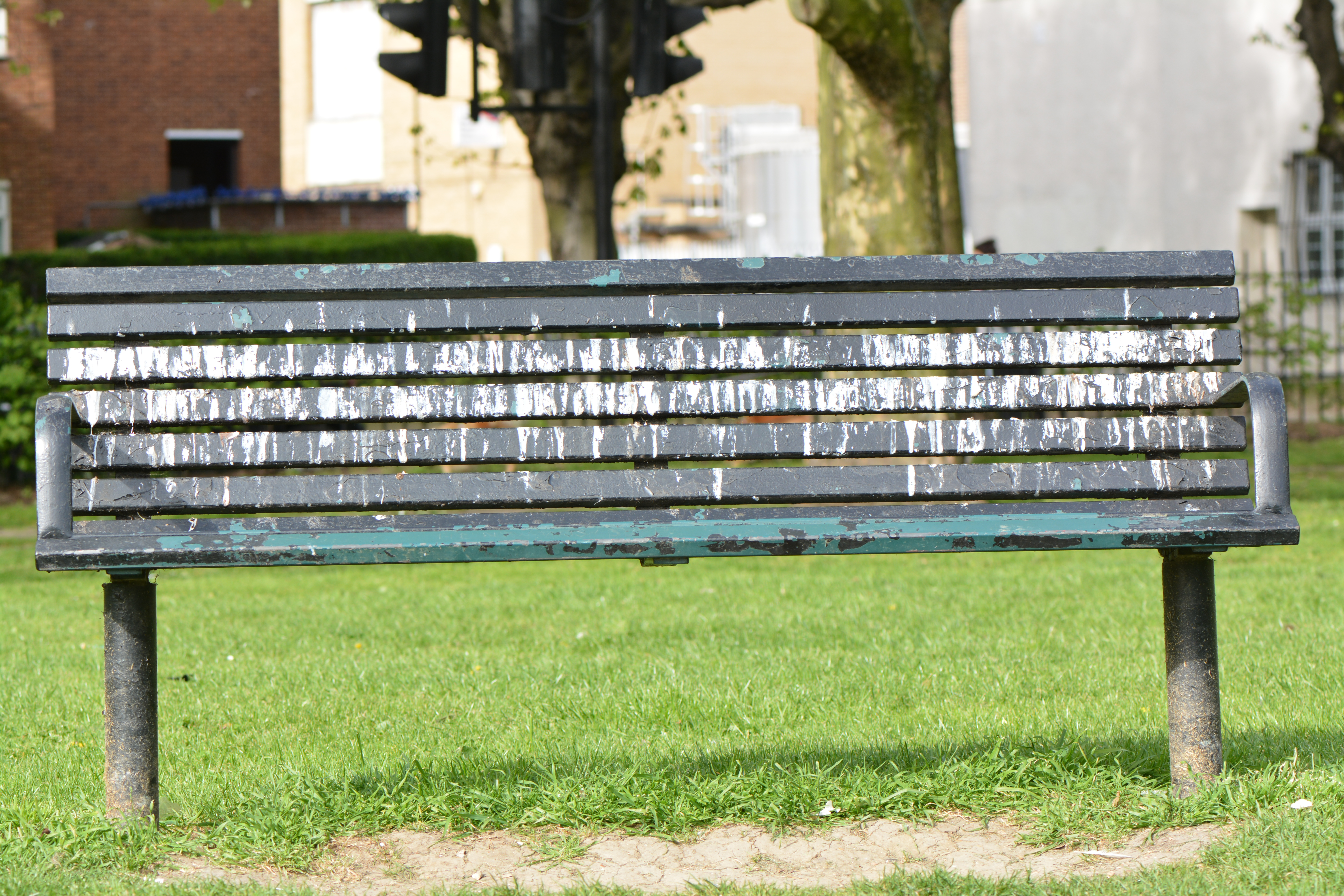 Fientes de corneilles sur un banc, sous un arbre de Shoreditch Park à Londres, en avril 2017